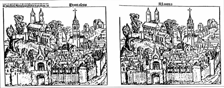 Eksempel på at samme tresnitt er brukt for å illustrere omtalen av to helt forskjellige byer, Damaskus og Mantua, i 1400-talls-verket Liber Chronicarum